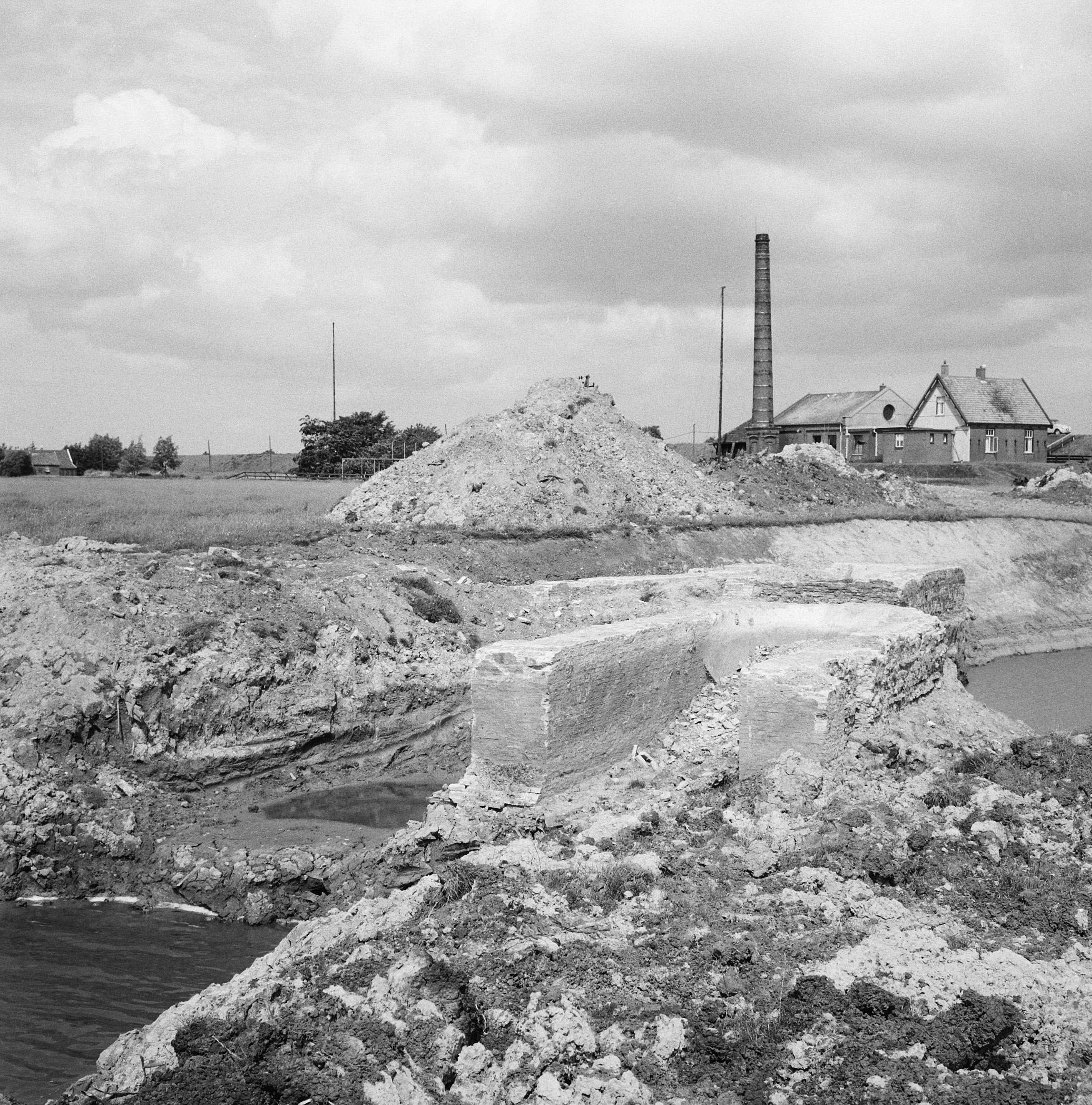 Collectie / Archief : Fotocollectie Nederlandse Heidemaatschappij Reportage / Serie : [ onbekend ] Beschrijving : inpoldering en bemaling, gemalen, funderingen, ruilverkavelingen, de drieban Datum : juli 1963 Trefwoorden : funderingen, gemalen, inpoldering en bemaling, ruilverkavelingen Persoonsnaam : de drieban Fotograaf : Fotograaf Onbekend / Heidemij Auteursrechthebbende : Nationaal Archief Materiaalsoort : Negatief (zwart/wit) Nummer archiefinventaris : bekijk toegang 2.24.06.02 Bestanddeelnummer : 159-1057